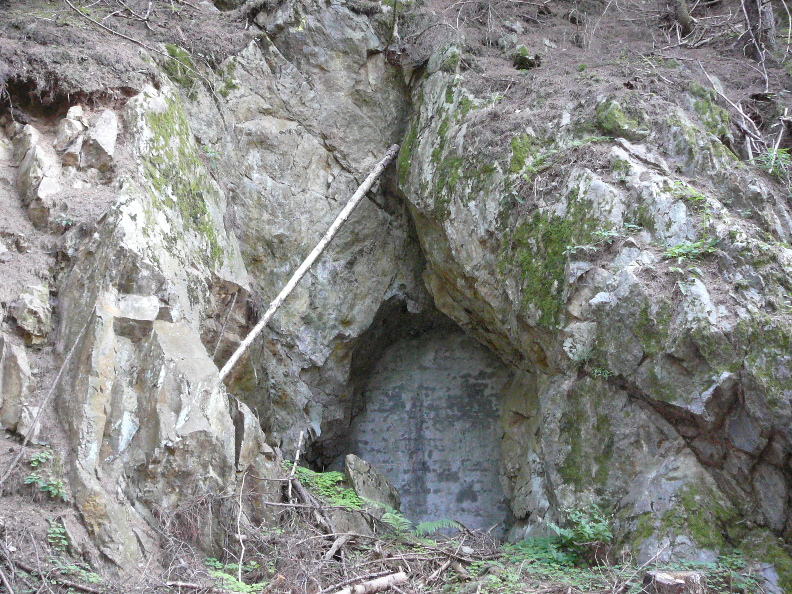 Opera 16 Mules-ingresso